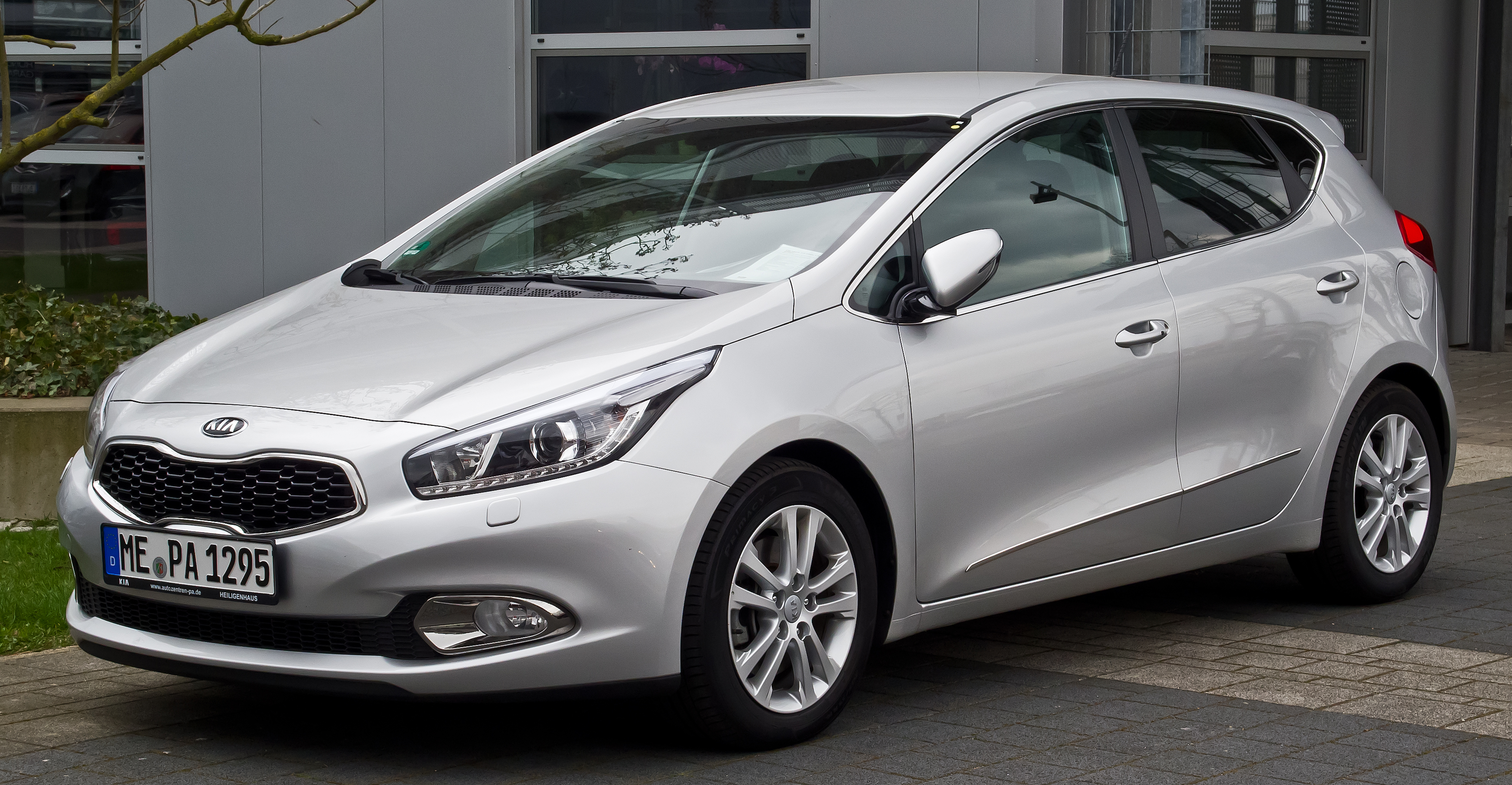 Kia cee'd 1.6 CRDi 128 Spirit (JD)